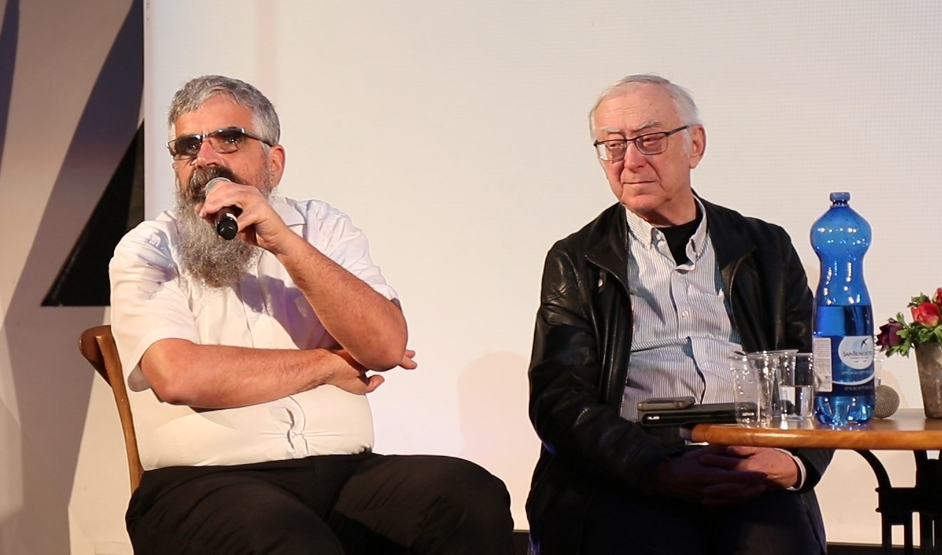 הרב יובל שרלו עם פרופ' אסא כשר בפורום לזיכרו של עמנואל מורנו. קרדיט: רווח הפקות